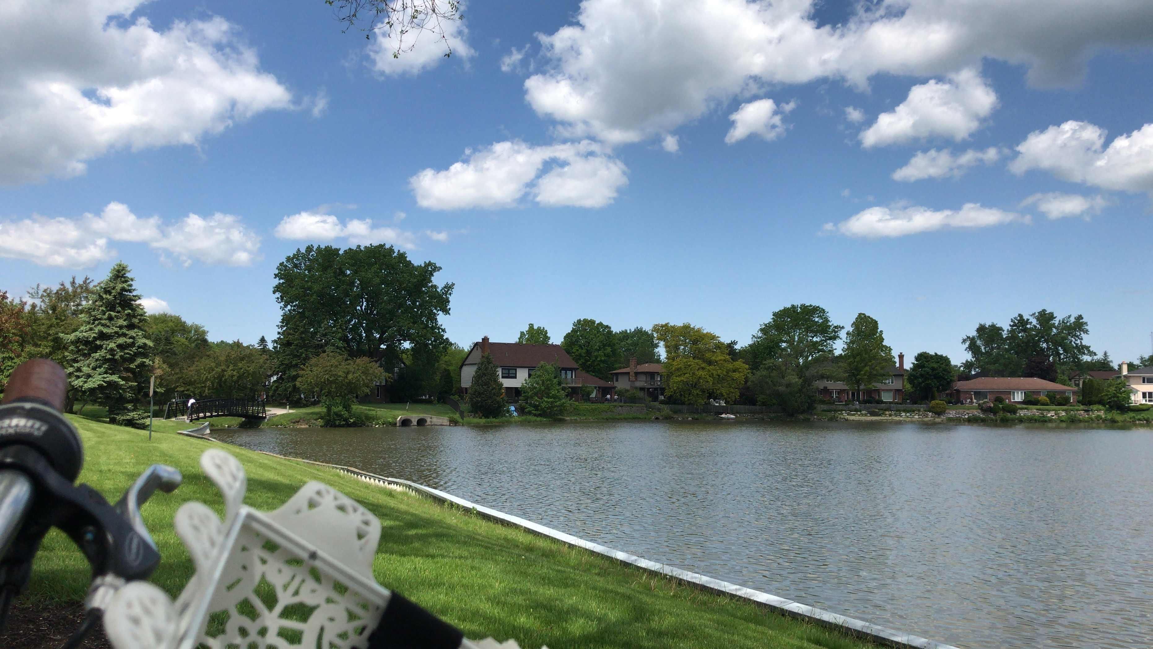 Stadtteil 27